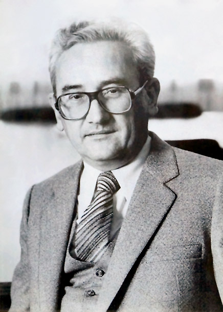 Српски (ћирилица): Др Душан П. Попов Кршин из Мокрина, nовинар, секретар Матице српске, главни уредник Телевизије Нови Сад, иницијатор и аутор Енциклопедије Новог Сада. Фотографија у власништву Завичајног музеја из Мокрина